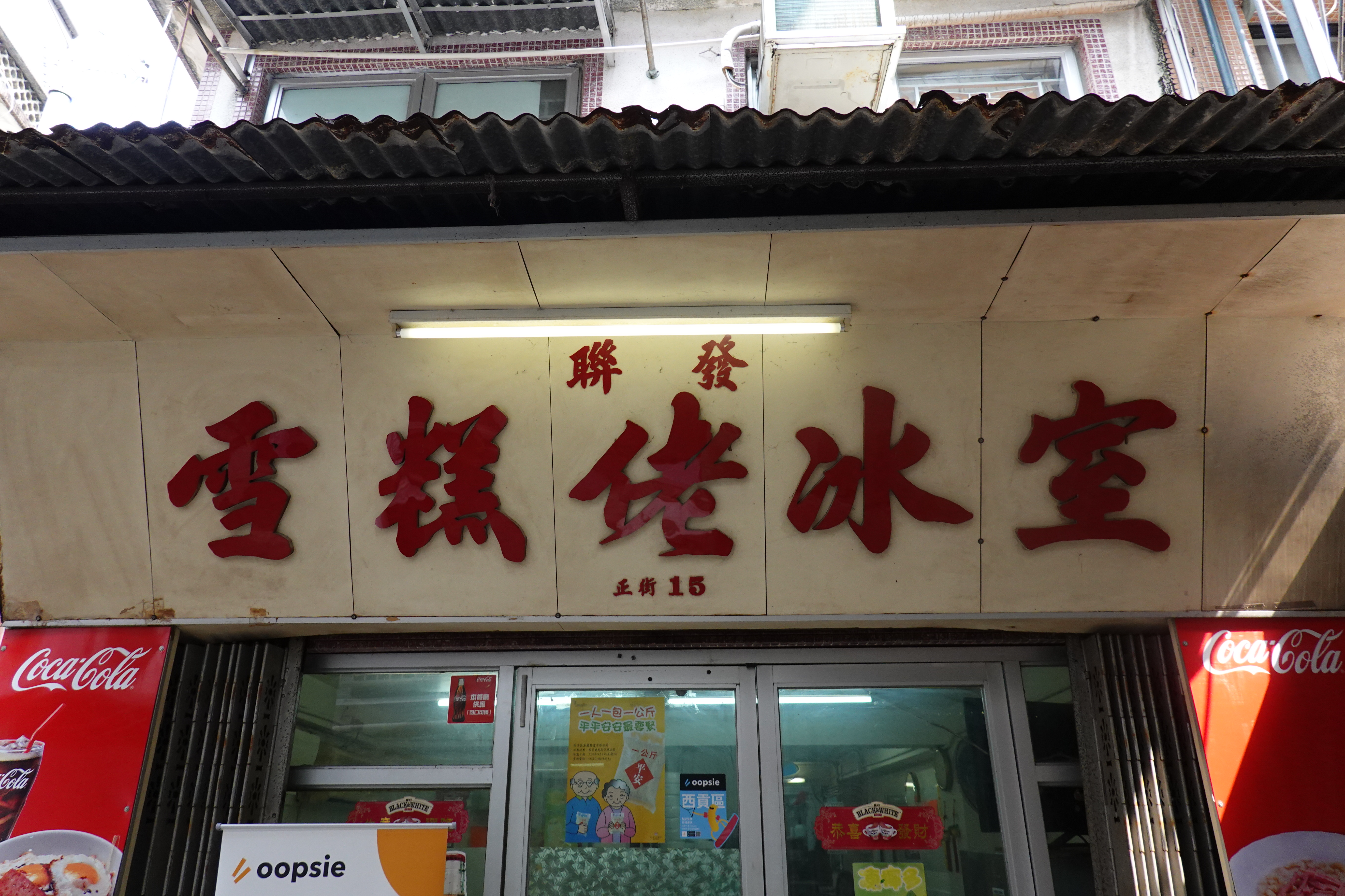 粵語: 雪糕佬冰室